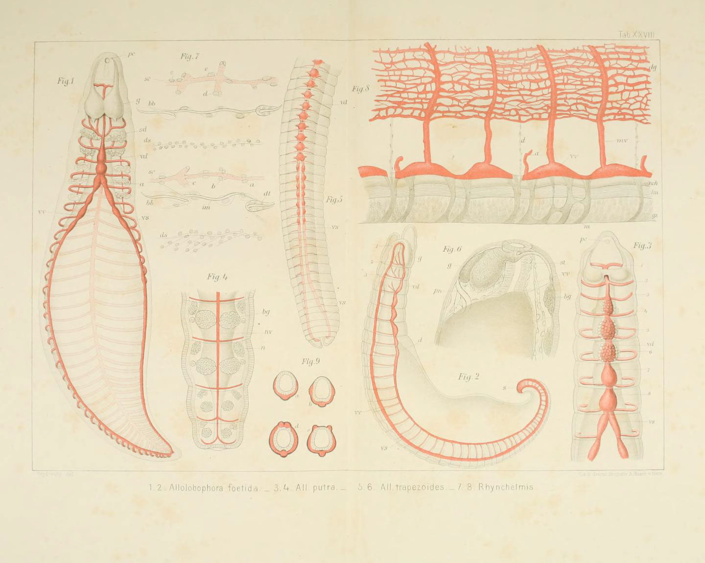 U All All ti '